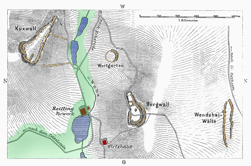 Nachkolorierte Kartenskizze mit Burgwällen in der Umgebung des Reitlingstales, westlicher Elm (Norden ist rechts).